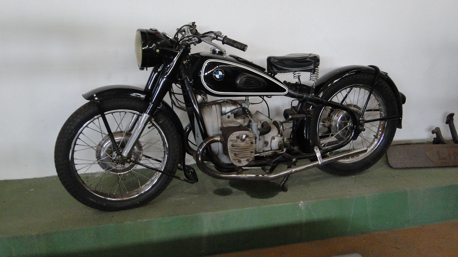 museu de bebedouro 06-09-2010 11-104